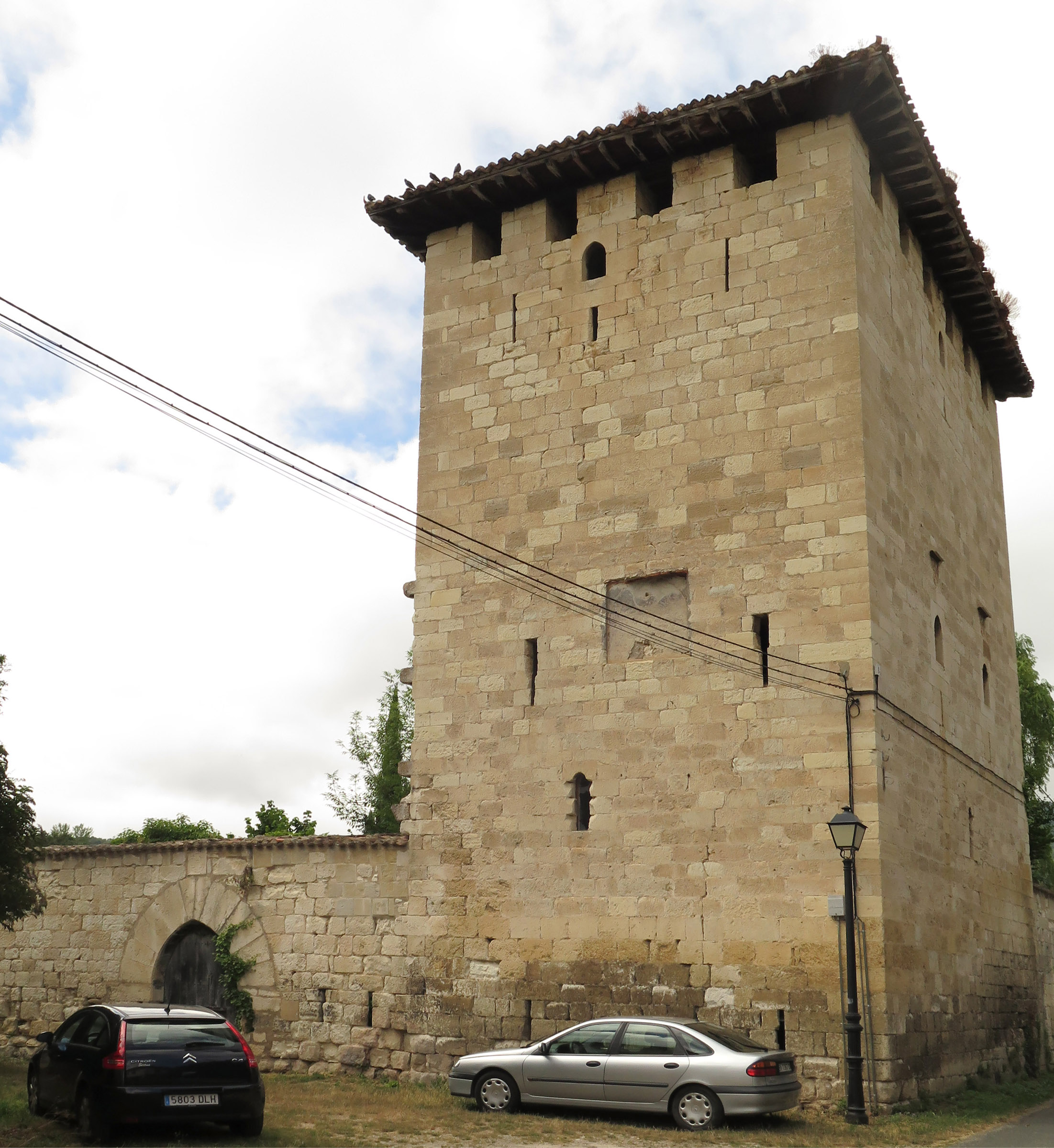 Torre de los Condestables del pueblo de Valpuesta (provincia de Burgos), en los valles de San Zadornil y Valdegovía.